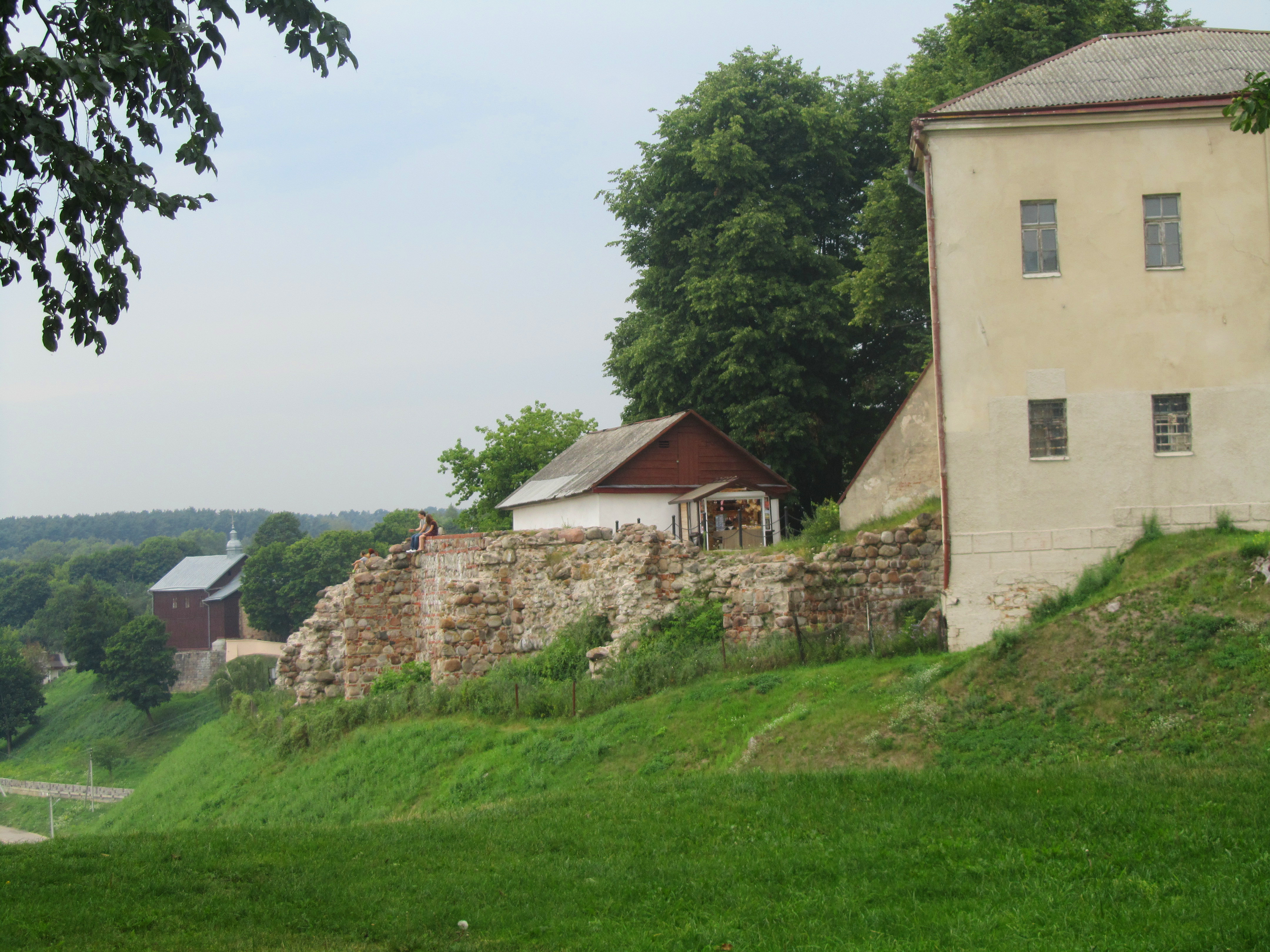 Беларуская (тарашкевіца): Комплекс Старога замка:палацфрагмэнт абарончых сьценНіжняя царква (руіны)Верхняя царква (рэшткі)княжацкі хорам (руіны)мостзамчышча This is a photo of Belarusian heritage monument. Reference number: 411Г000003 ( WLM)